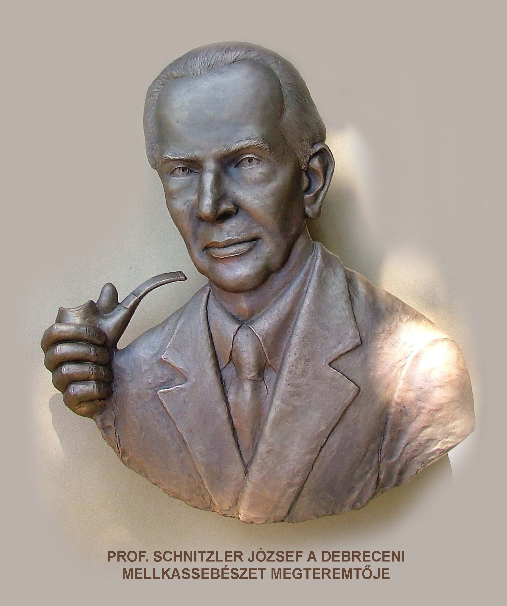 Juha Richárd: Schnitzler József (bronz dombormű) (Debrecen, Móricz Zsigmond körút 22., Auguszta Sebészeti Központ II. emelet)